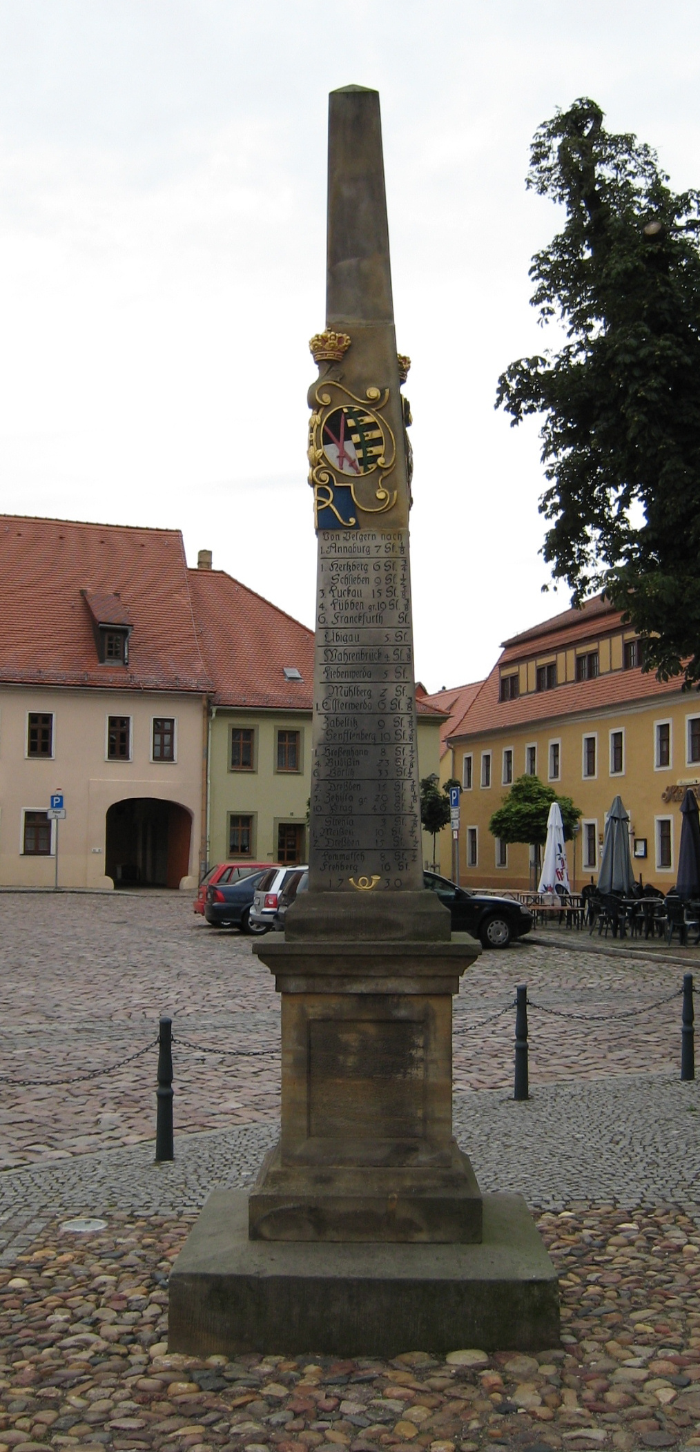 Postmeilensäule zu Belgern in Sachsen